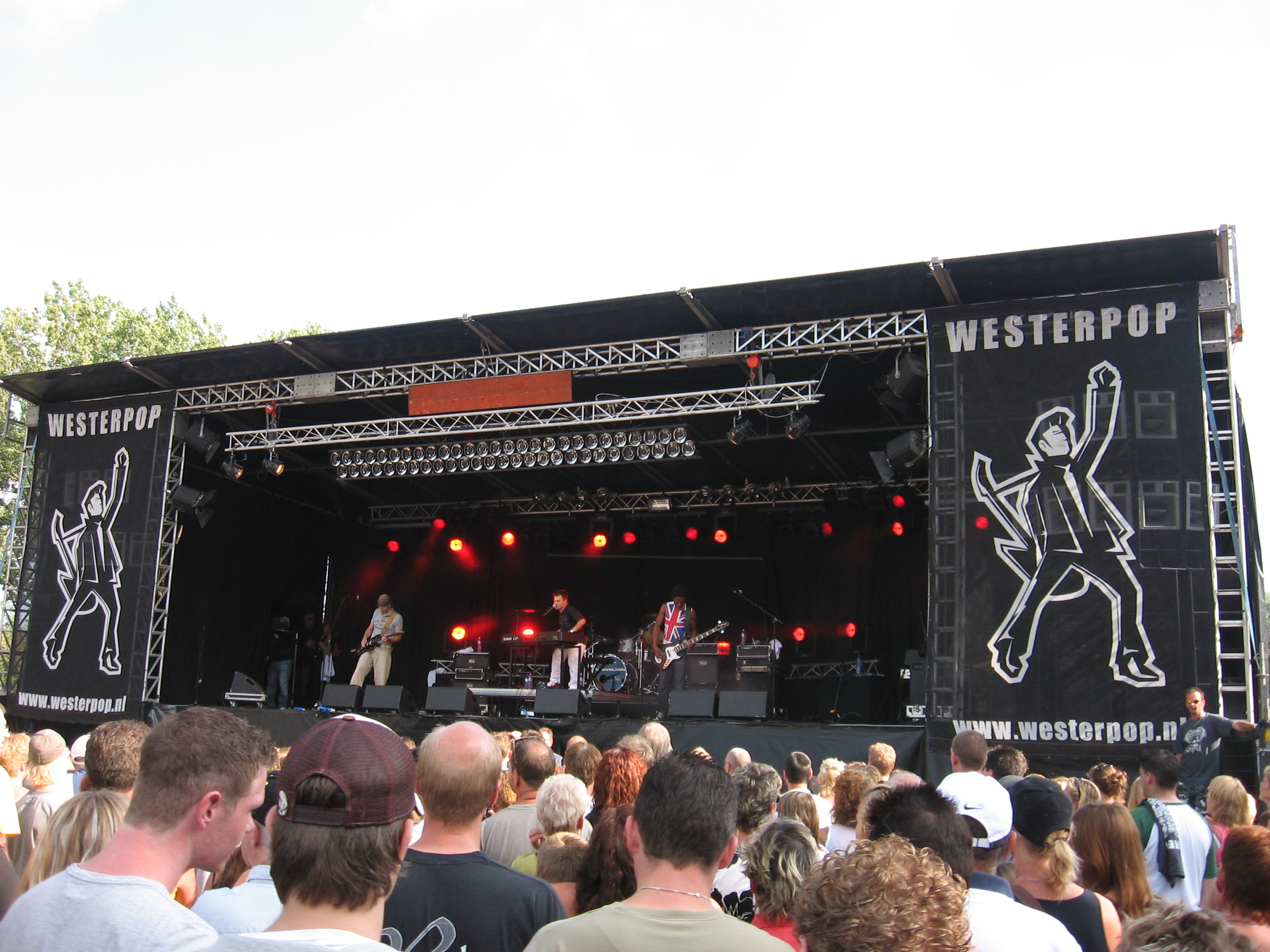 Westerpop